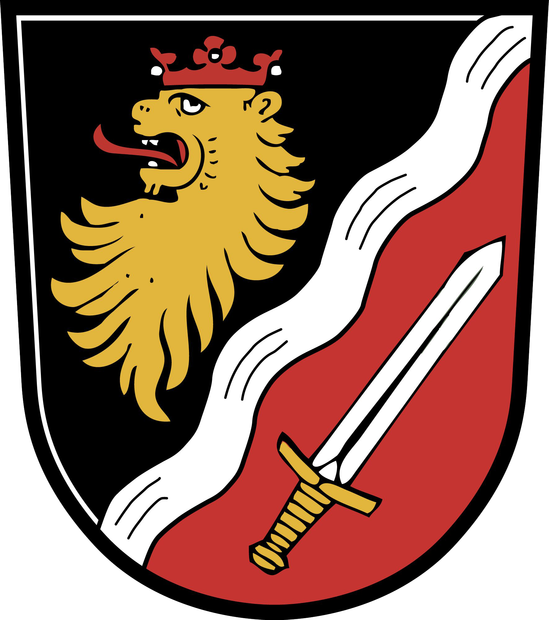 Der Wellenbalken versinnbildlicht die Wasserläufe im Gemeindegebiet, die Haidenaab und den in die Haidenaab mündenden Schwarzenbach, der der Gemeinde den Namen gab. Der goldene Löwenkopf, eine Minderung des pfälzischen Löwen, bringt die historische Beziehung der Gemeinde zu den wittelsbachischen Landesherren zum Ausdruck. Schwarzenbach wird schon im Herzogsurbar von 1285 als herzogliches, zur Burg Waldeck gehörendes Gut und später als Teil des Unteramts Pressath im Landrichteramt Waldeck genannt. Das Schwert im roten Feld ist vom Familienwappen der Nürnberger Patrizier Kreß hergeleitet, die von Mitte des 15. bis Mitte des 16. Jahrhunderts als oberpfälzische Landsassen auf dem zum Landsassengut Dießfurt gehörenden Hammergut Pechhof saßen. Das Symbol steht stellvertretend für die Reihe der wechselnden Besitzer auf Pechhof.